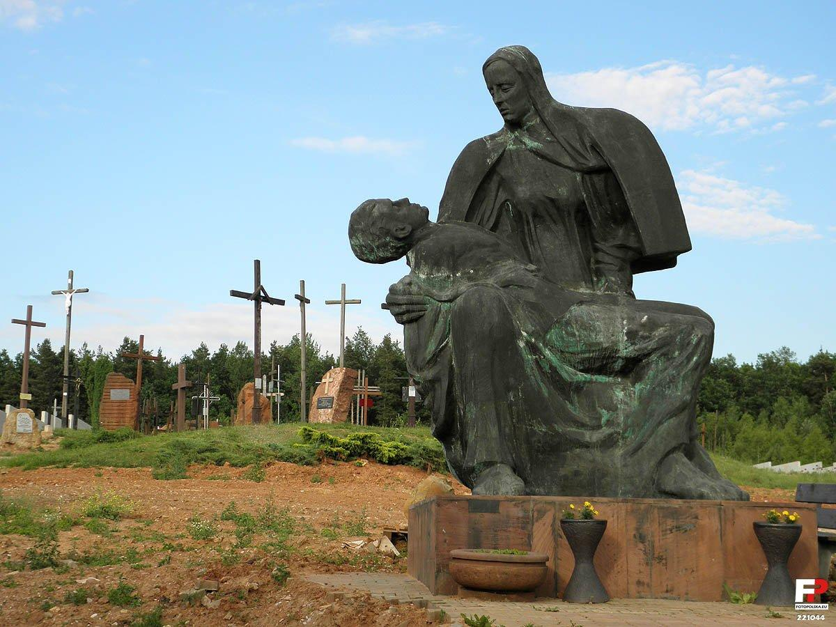 Pieta Michniowska